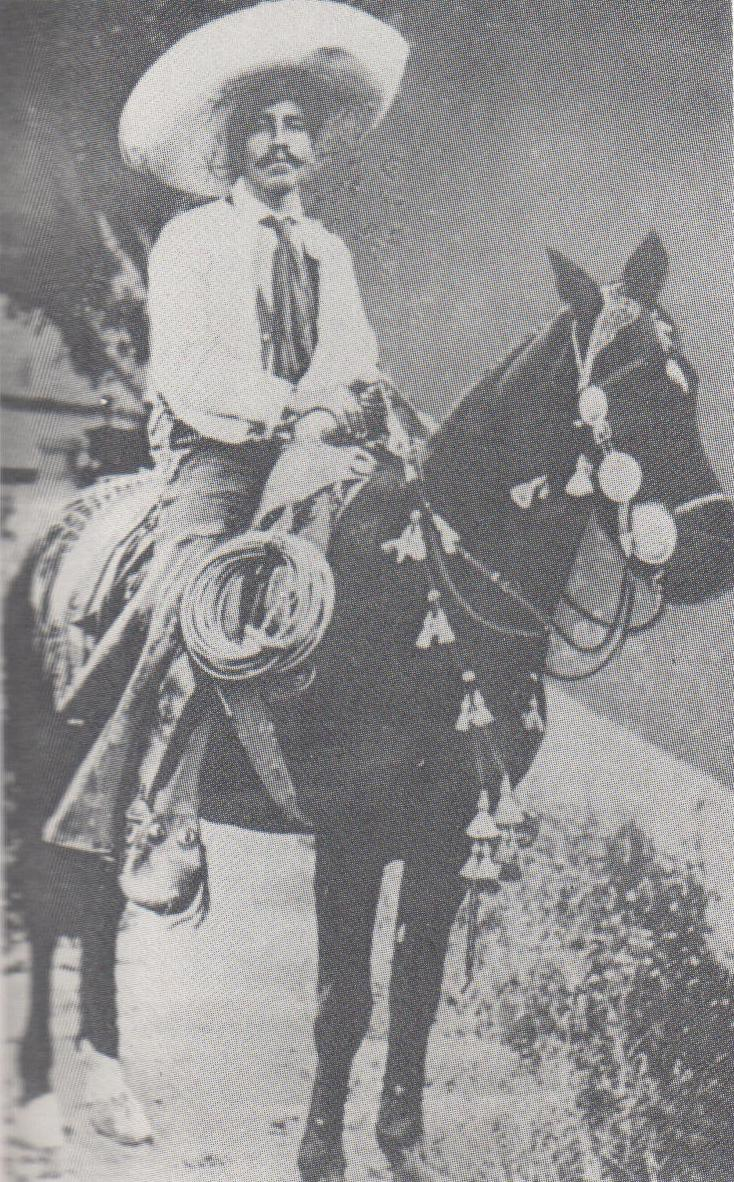 General Celestino Carnalla